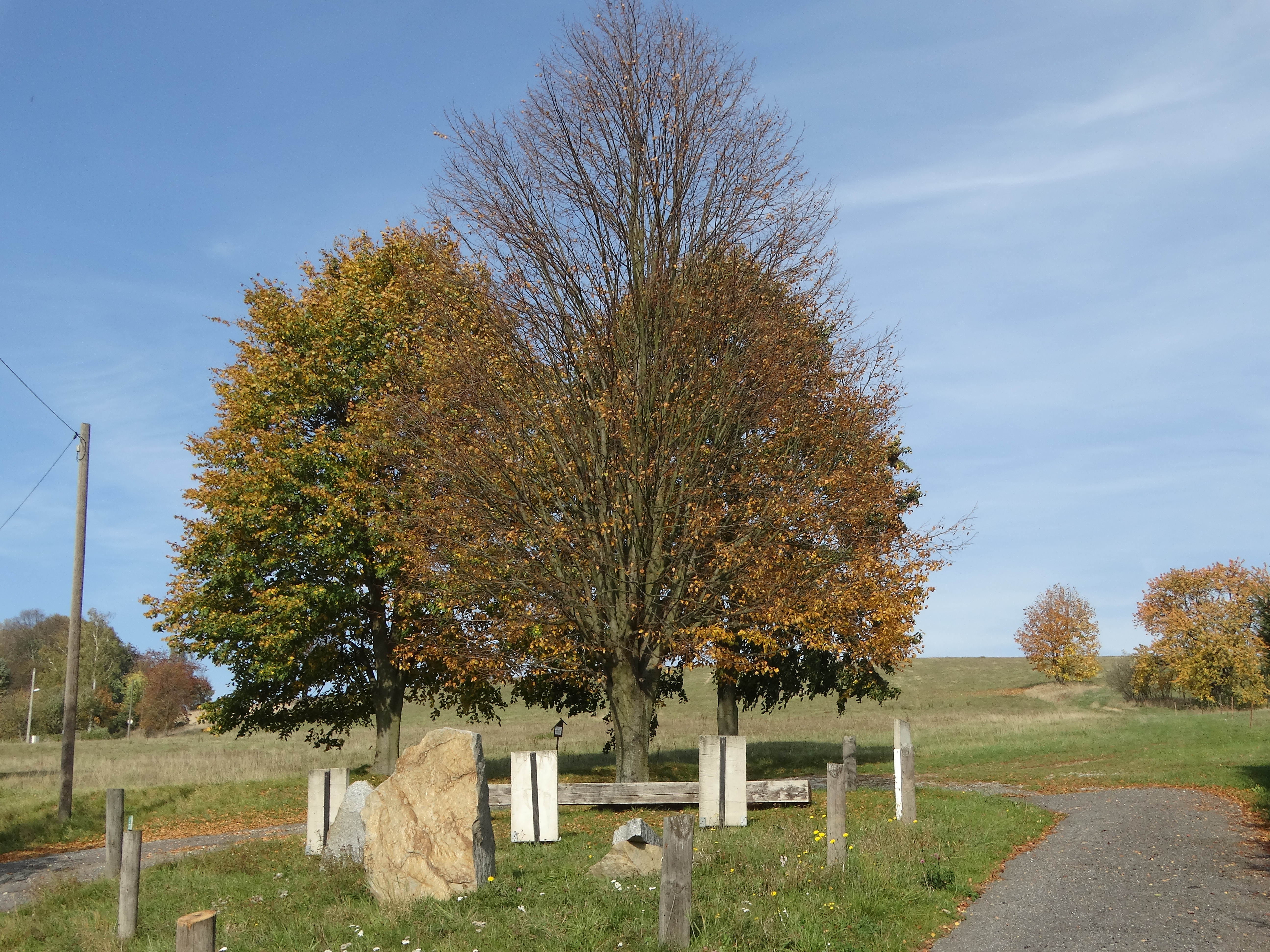 Der Platz mit Informationen zu Gesteinen befindet sich am nördlichen Dorfausgang von Rathewalde.